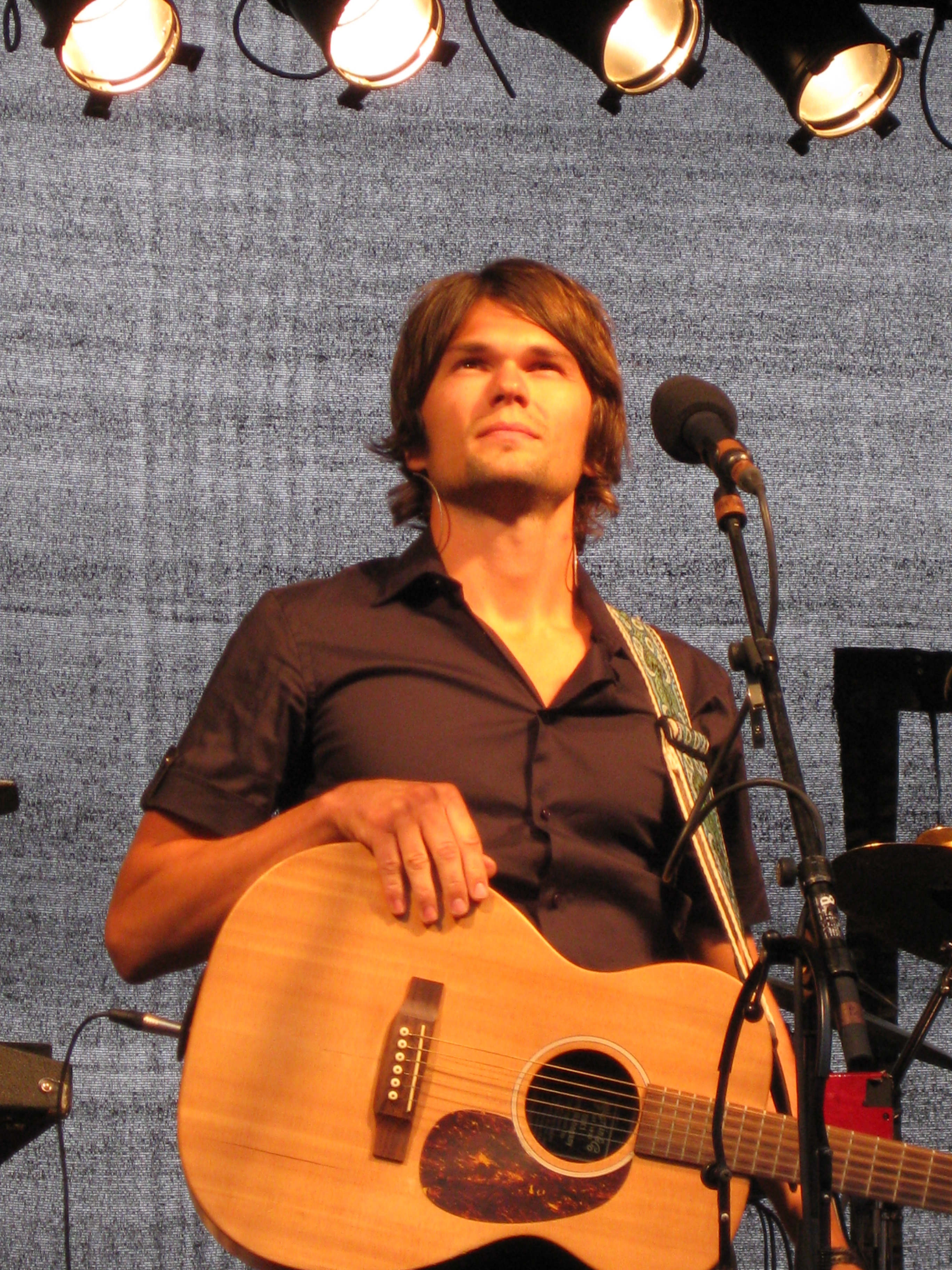 Paul Hansen i gruppa Vamp